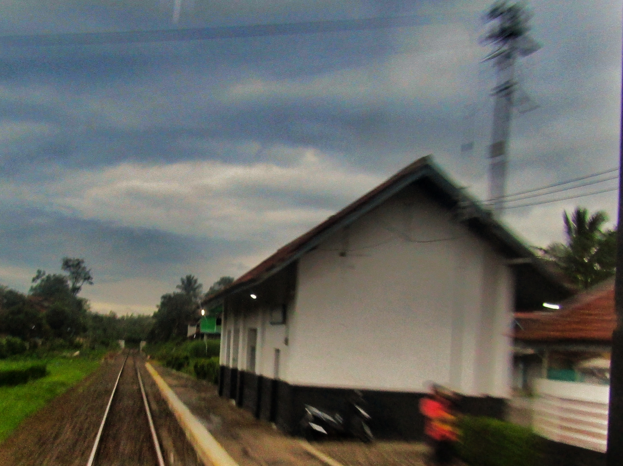 Bangunan Halte Leuwigoong 2020